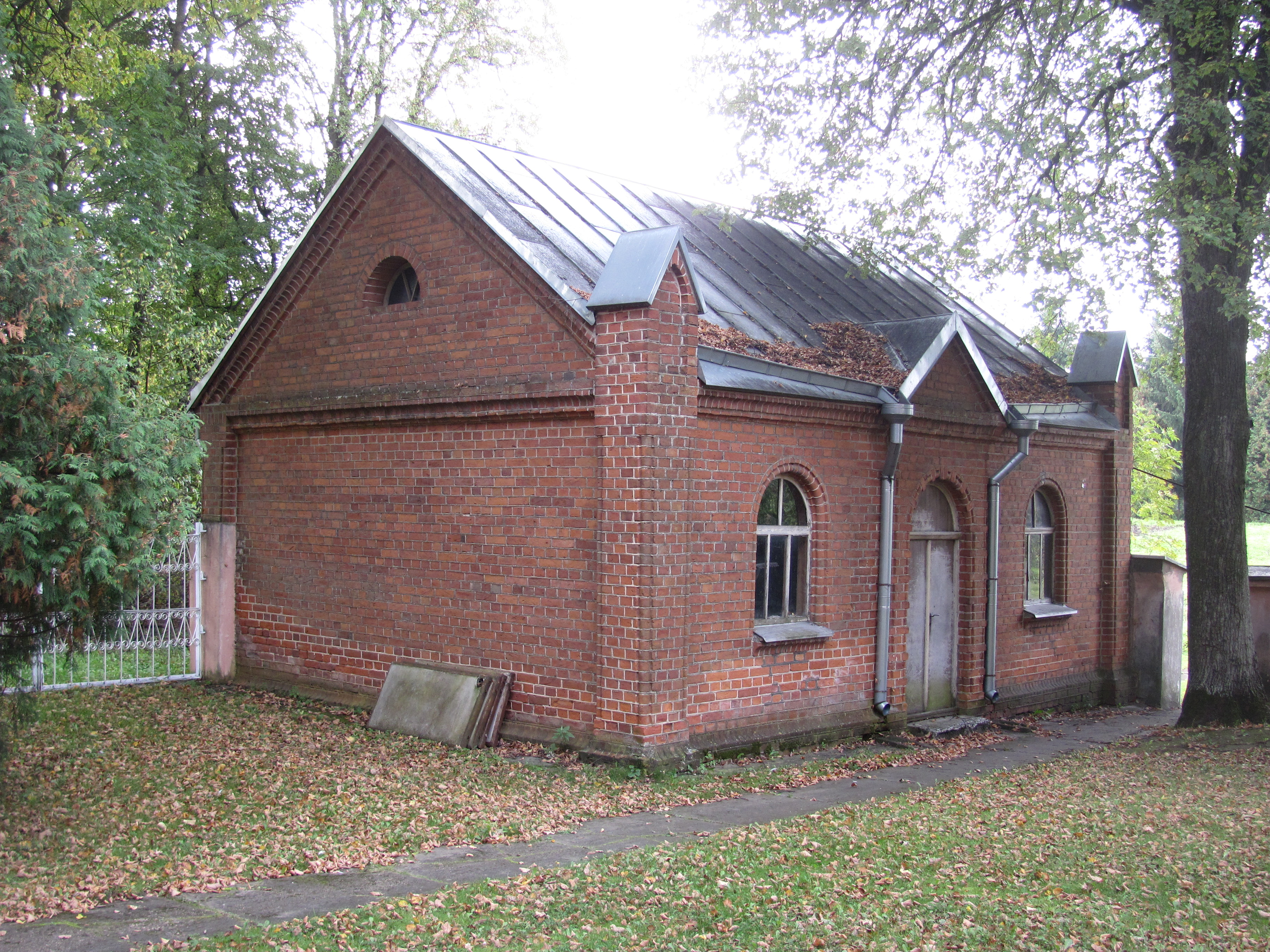 Užpaliai, Lithuania